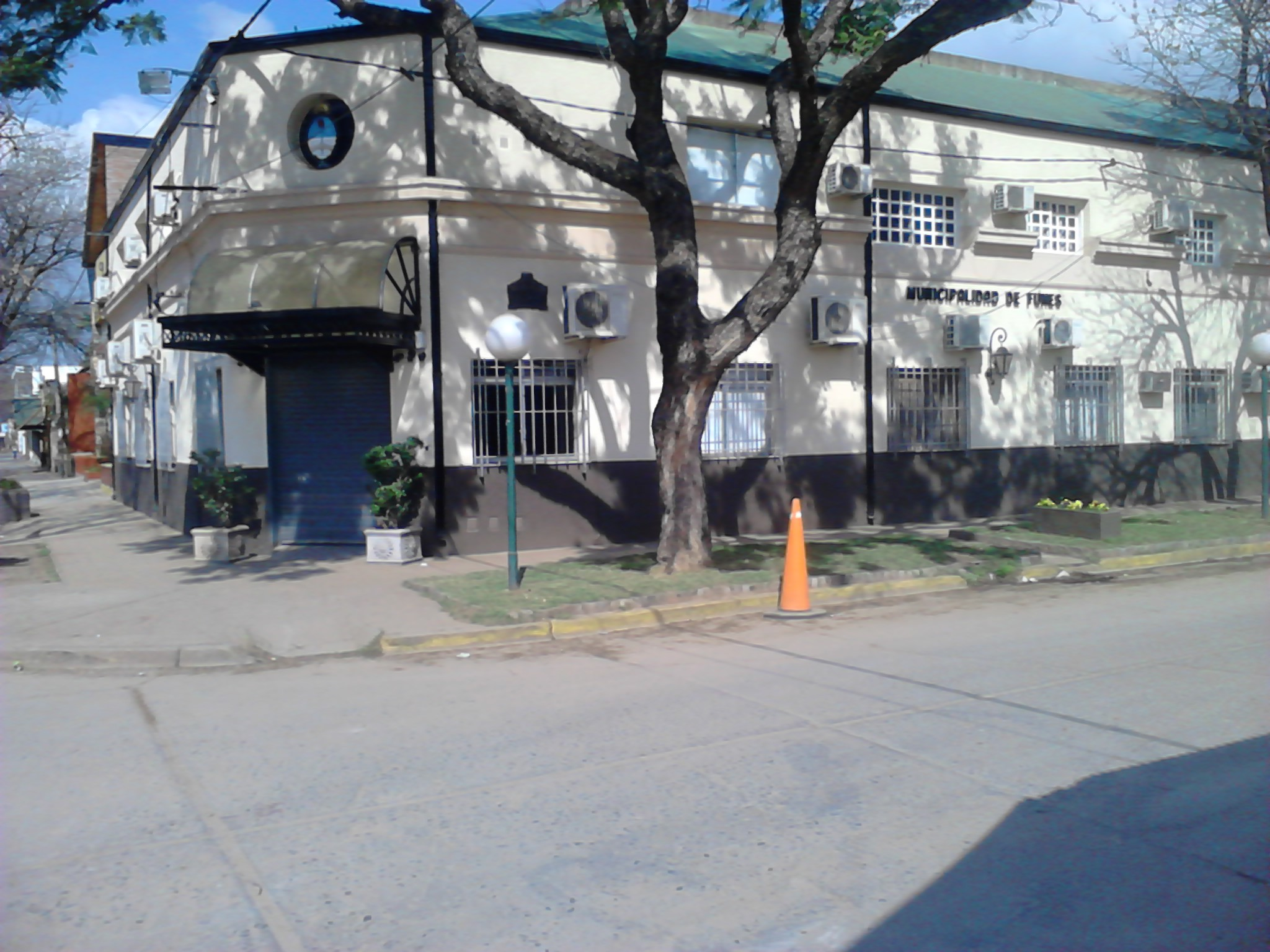 Vista de frente del Edificio Municipal de Funes.